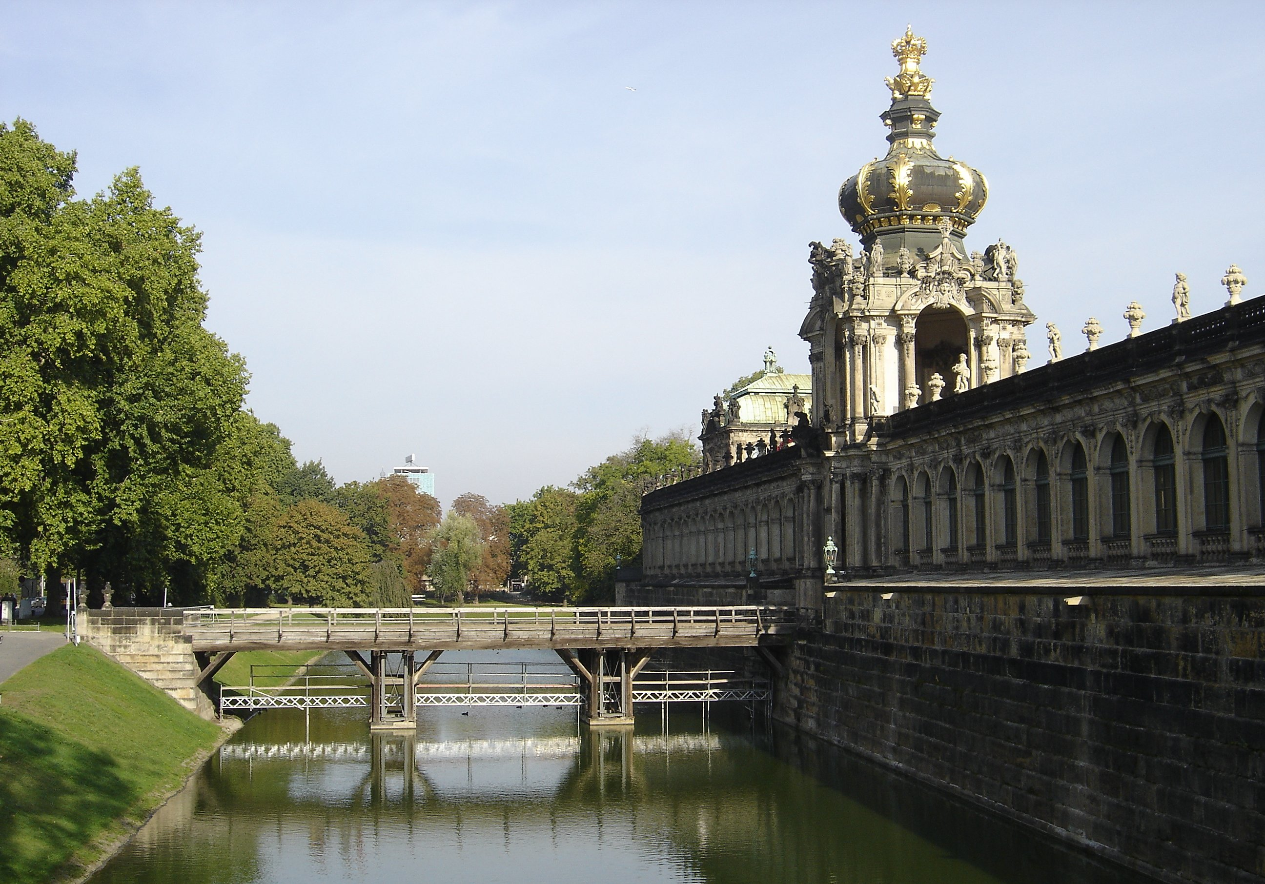 Zwingerteich in Dresden